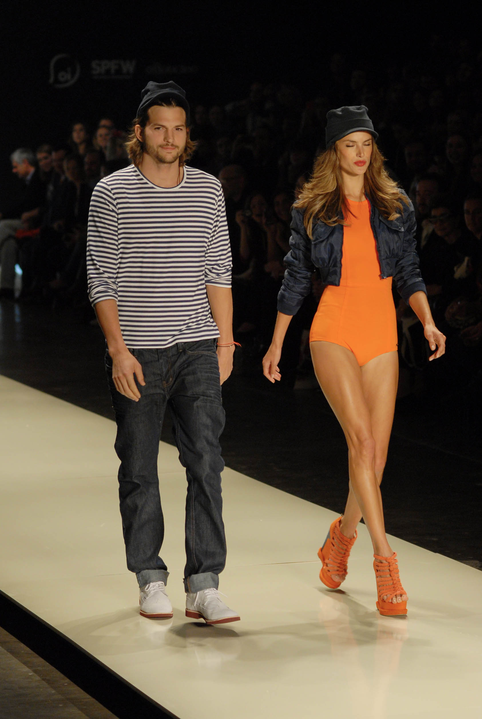 Foto: Marcos Madi